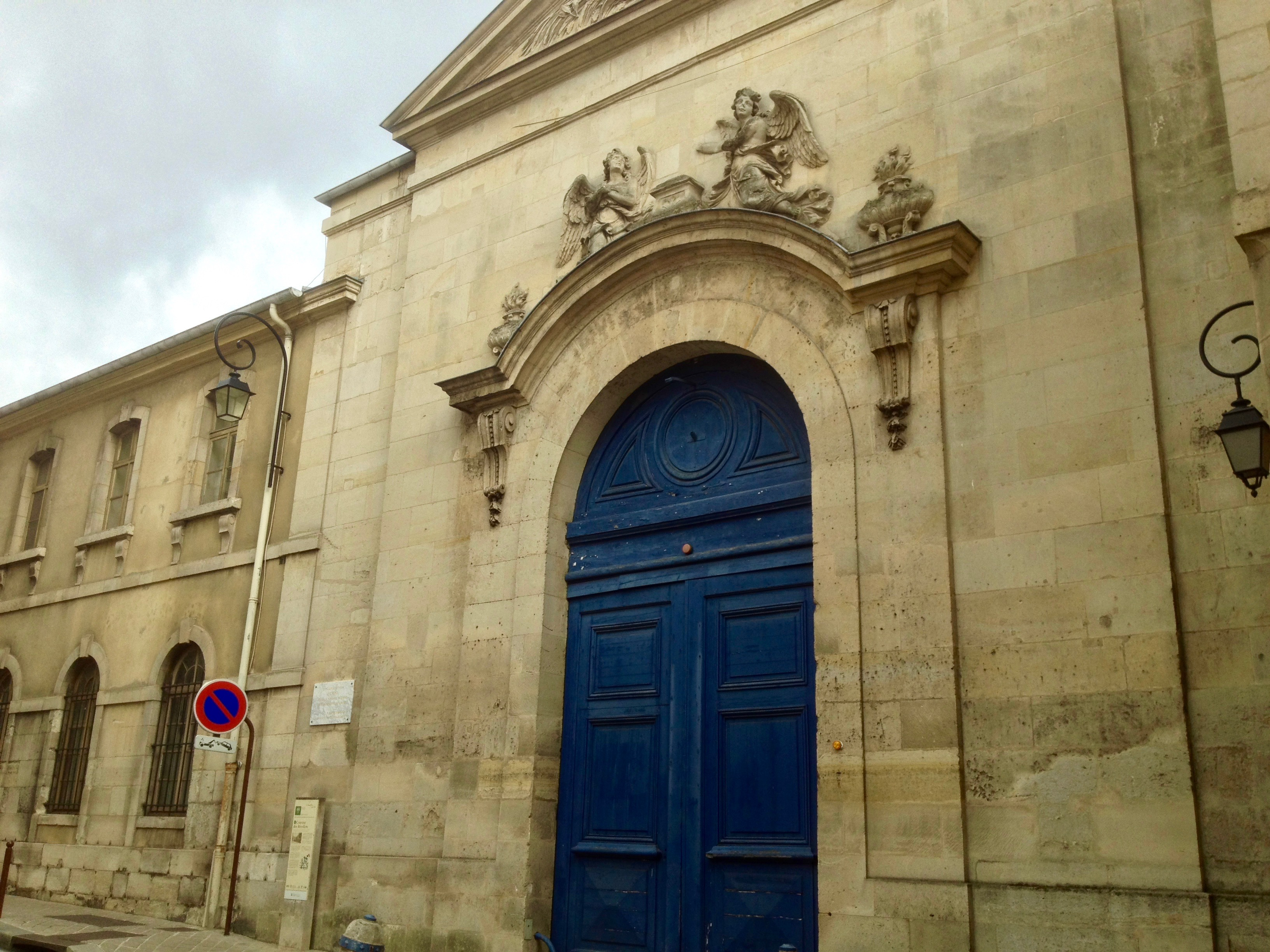 Portail (XVIIe siècle, martelé pendant la révolution, restauré en 1985), unique vestige de l'ancienne église (démolie en 1796 pour cause de vétusté) du Couvent des Récollets de Versailles. Hormis le portail de son église, seuls subsistent le cloître (réaffecté) et le jardin de l'ancien couvent, 9 rue des Récollets, Versailles, Yvelines, France [1].